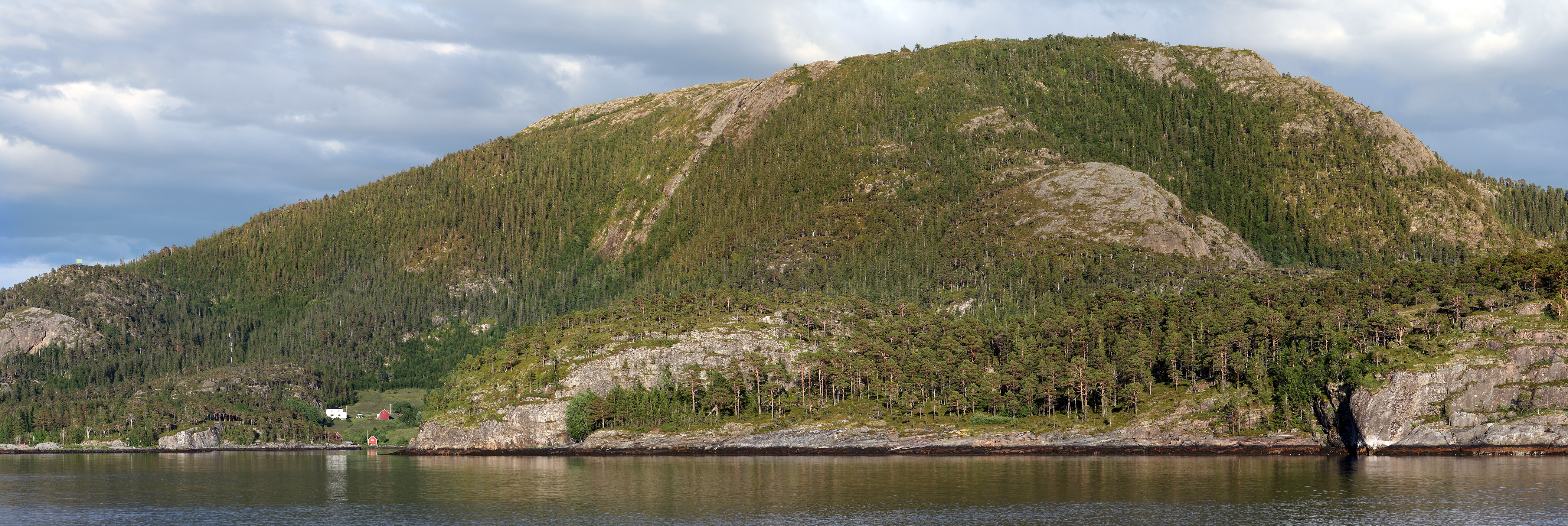 Hagafjellet, Salsbruket, Nærøy kommune, Nord Trøndelag